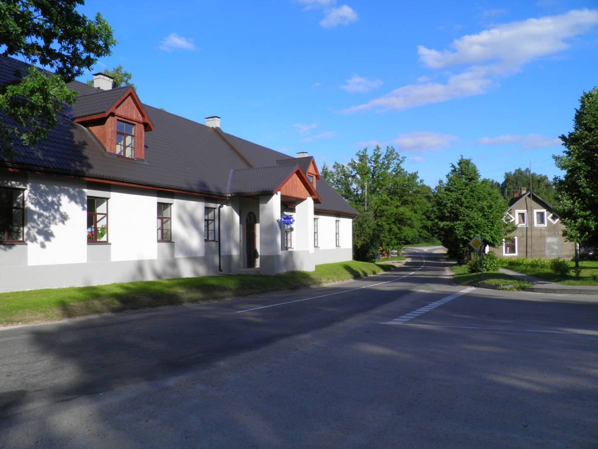 Серене | Sērene